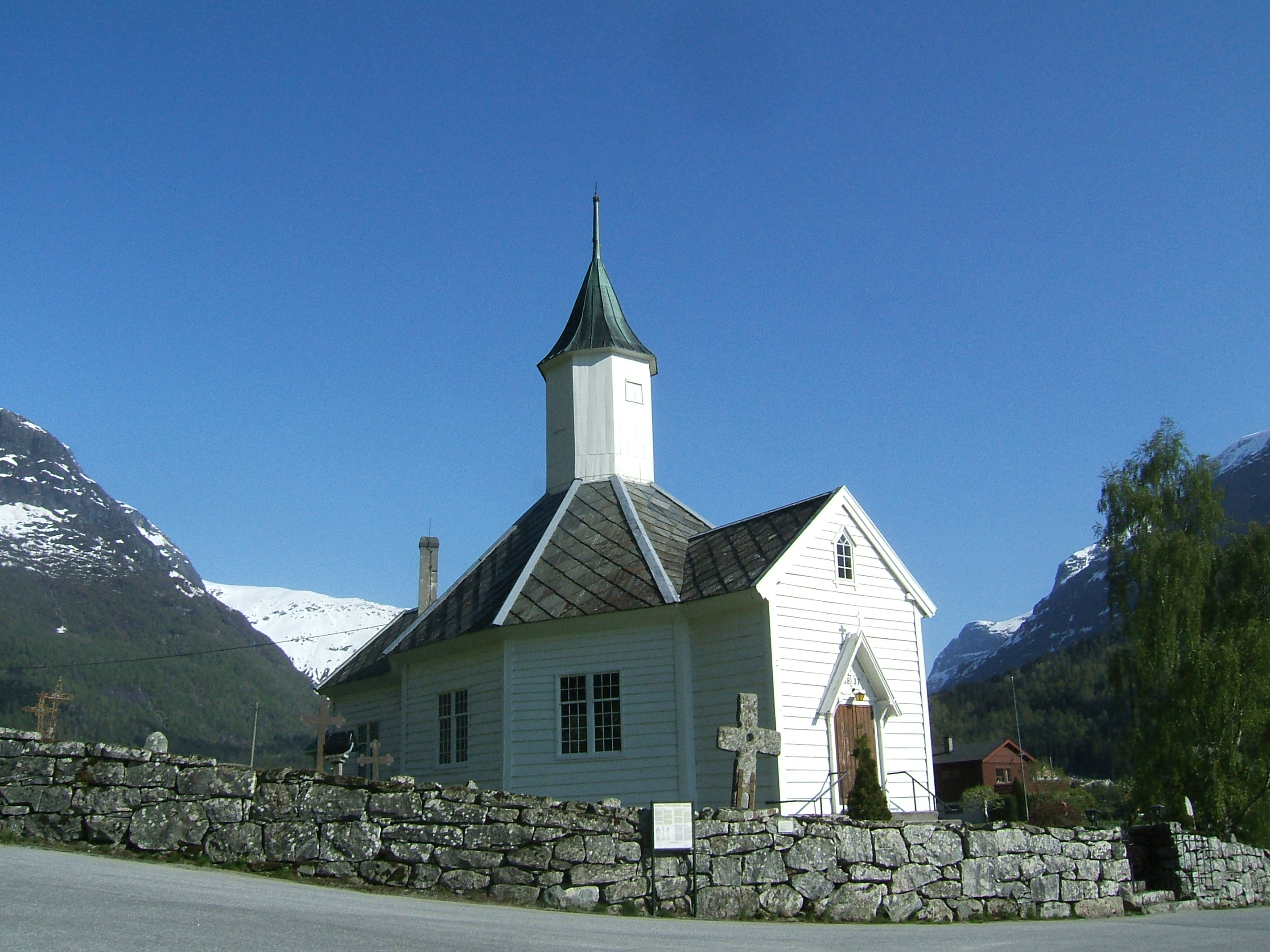 no: Loen kyrkje en: Loen church